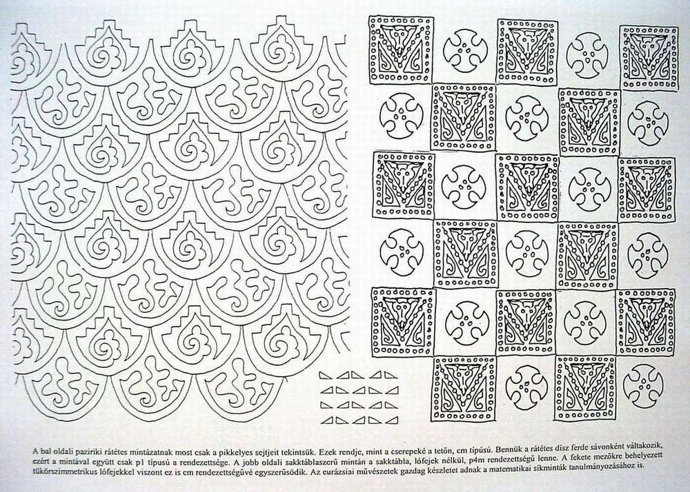 Két díszítőminta az Altaj-hegységből, Pazirikból